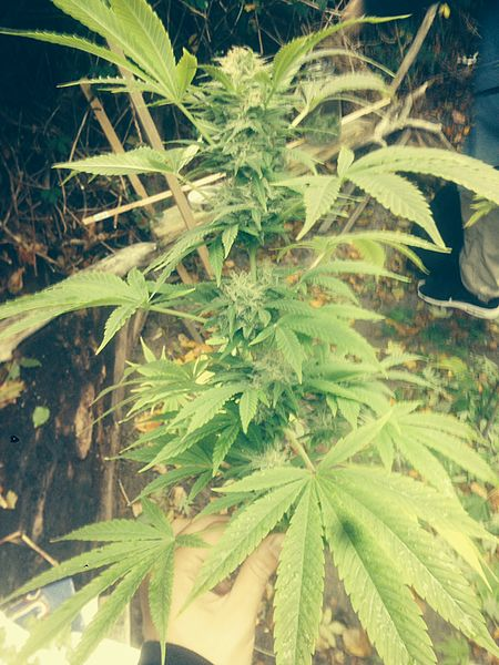 Fresh female cannabisplant with buds, grown outdoors in Denmark 2016